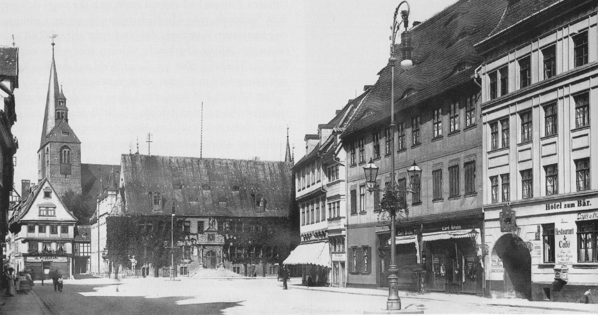 Marktplatz, Quedlinburg kurz nach 1900